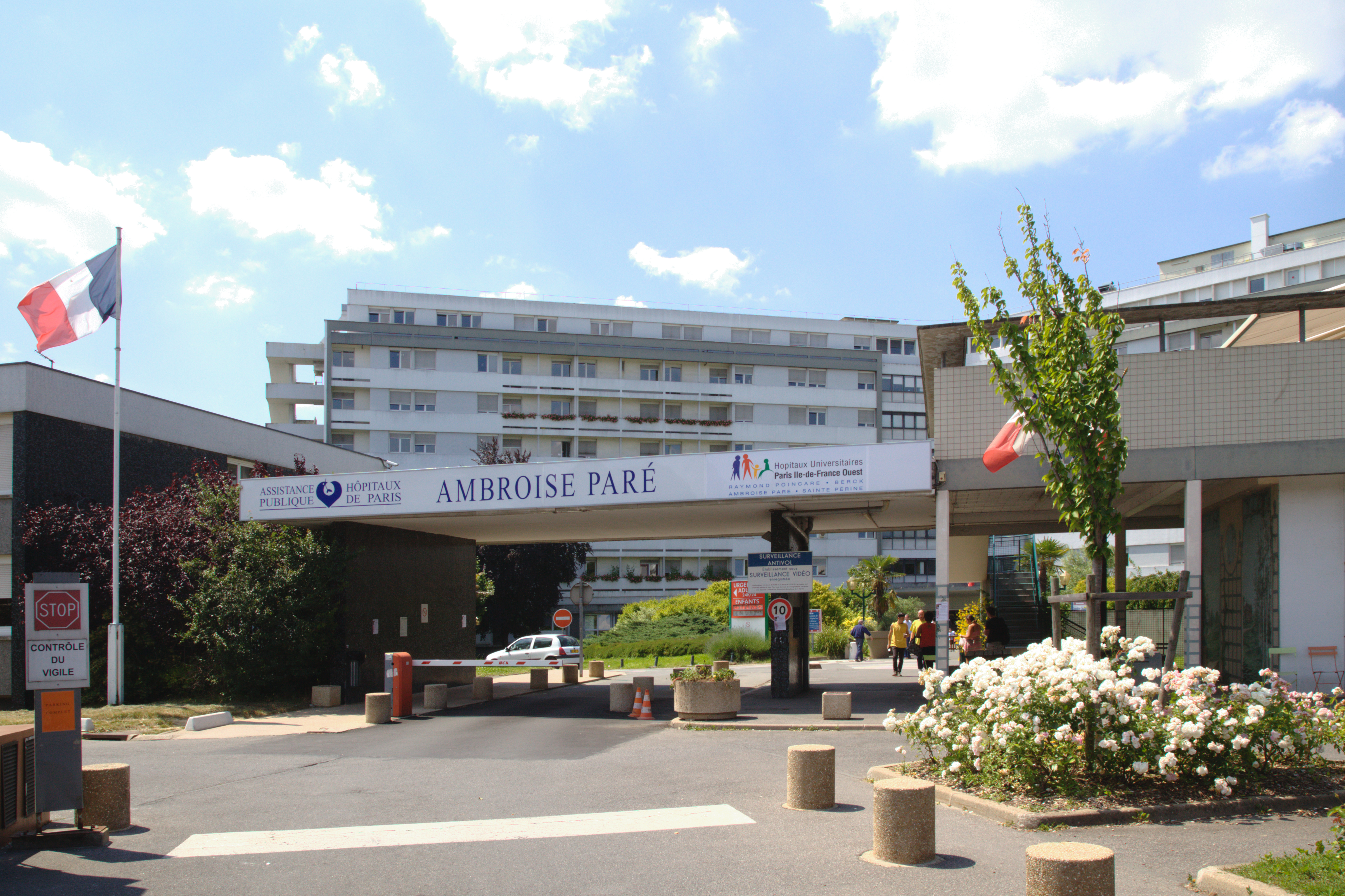 L'entrée prinicipale de l'hôpital Ambroise-Paré à Boulogne-Billancourt